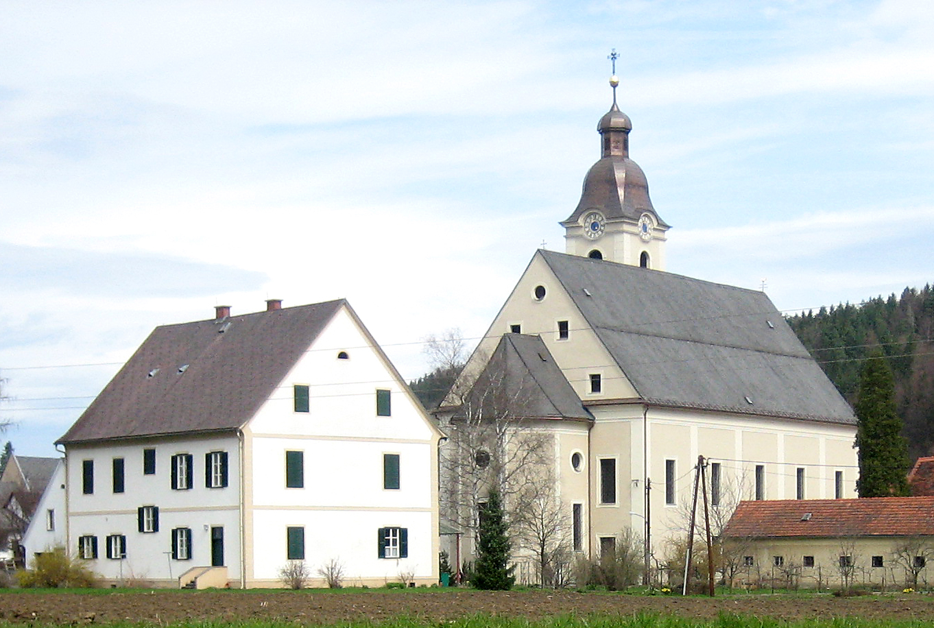 Kath. Pfarrkirche Mariä Geburt